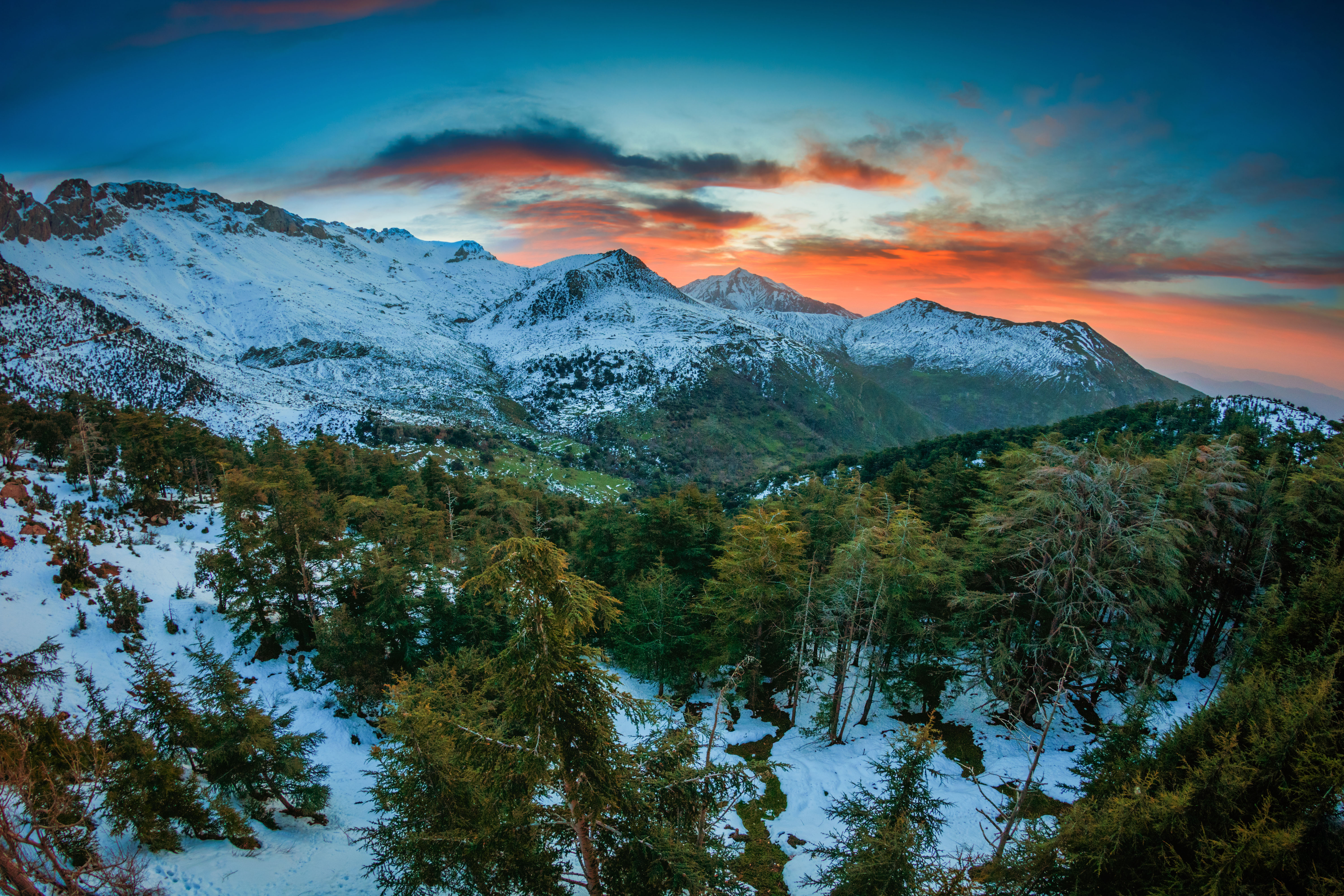 Tikjda naturel parc national at bouira algeria